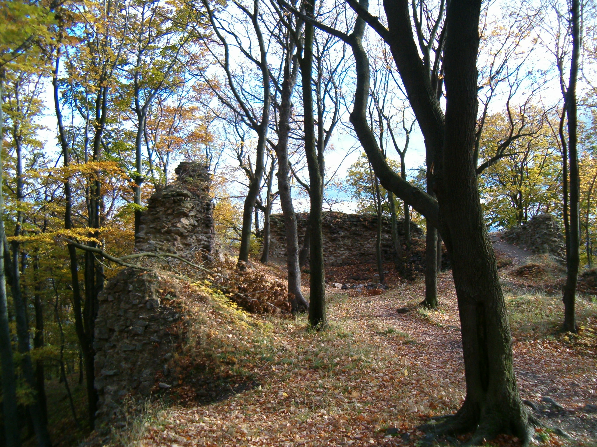 hrad kysperk